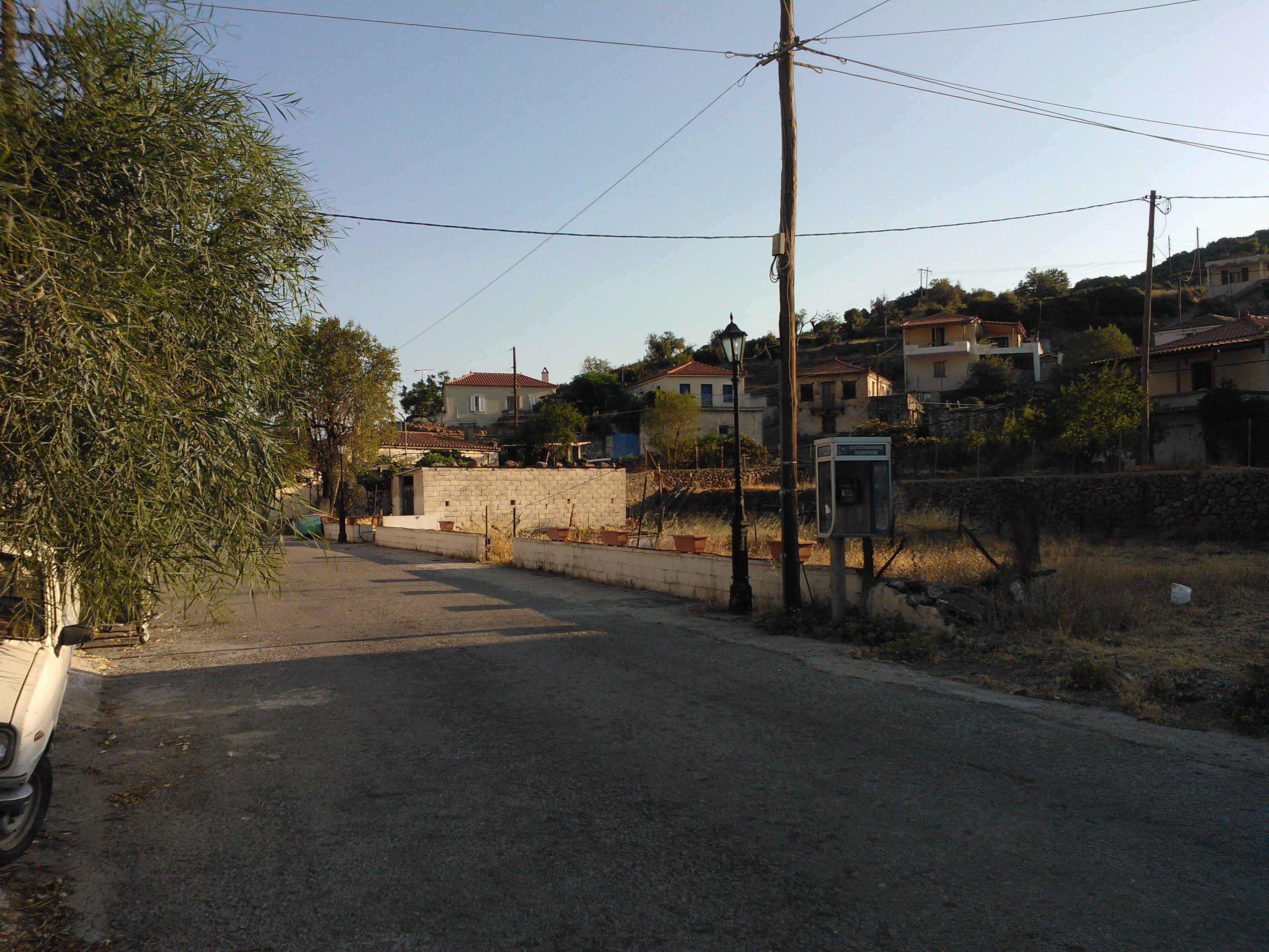 Посёлок Кипсели (Метана), Греция